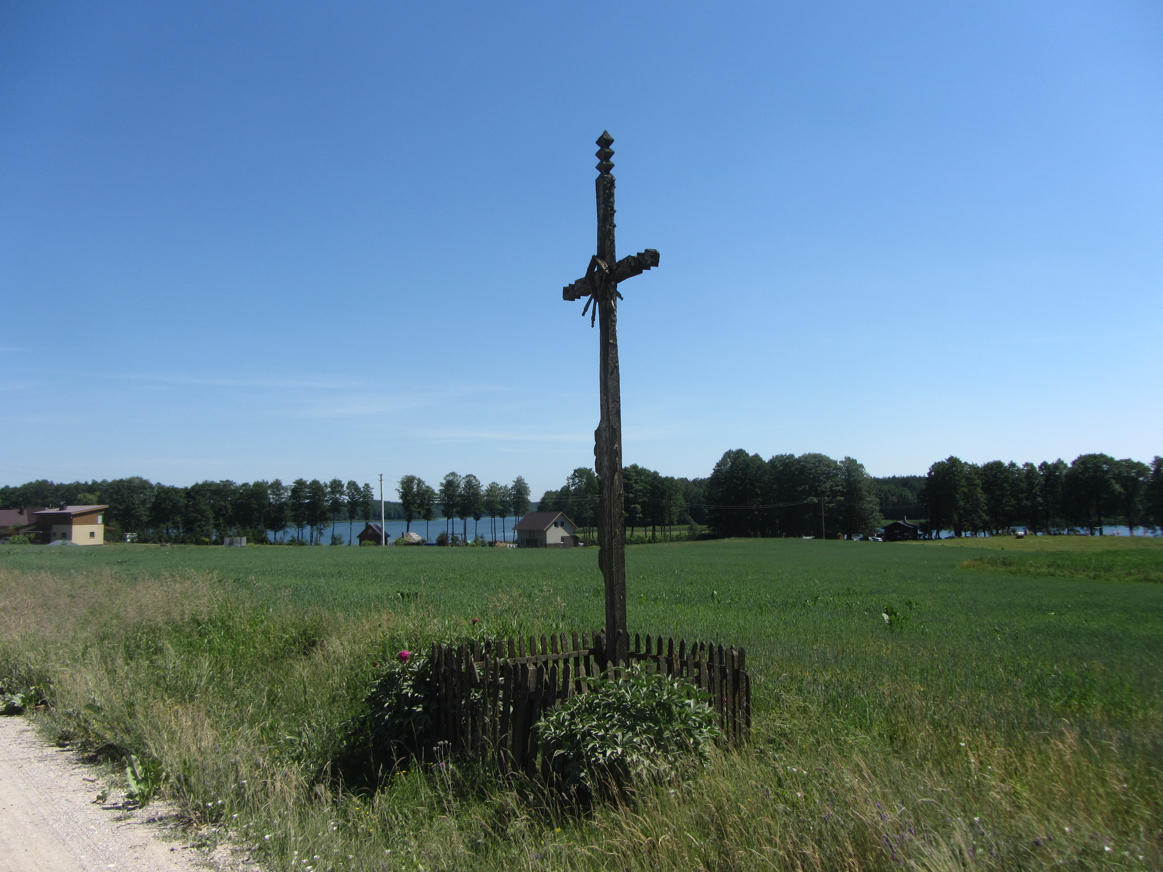 Alovės sen., Lithuania